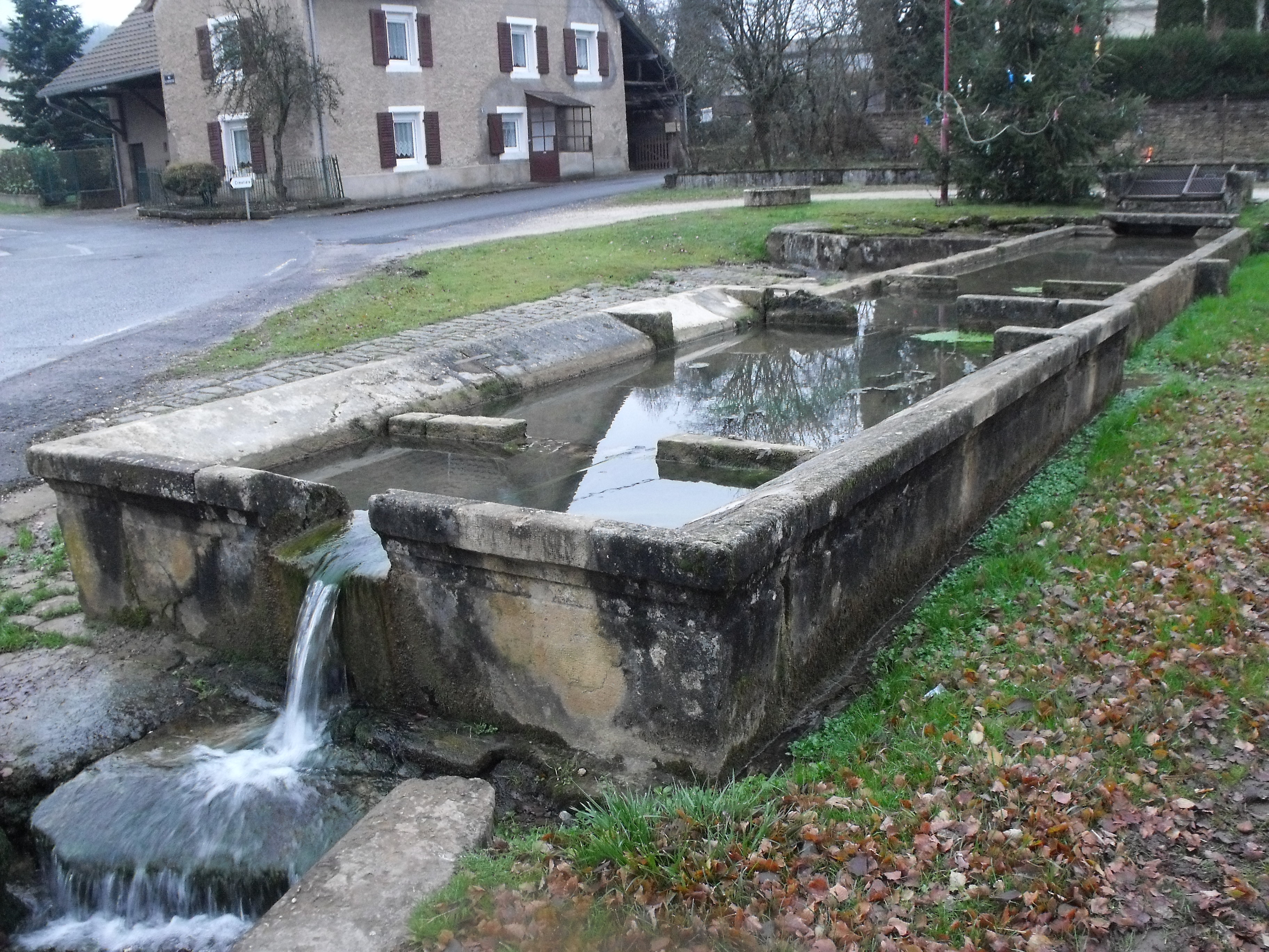 Fontaine à Presentevillers (Doubs, France)